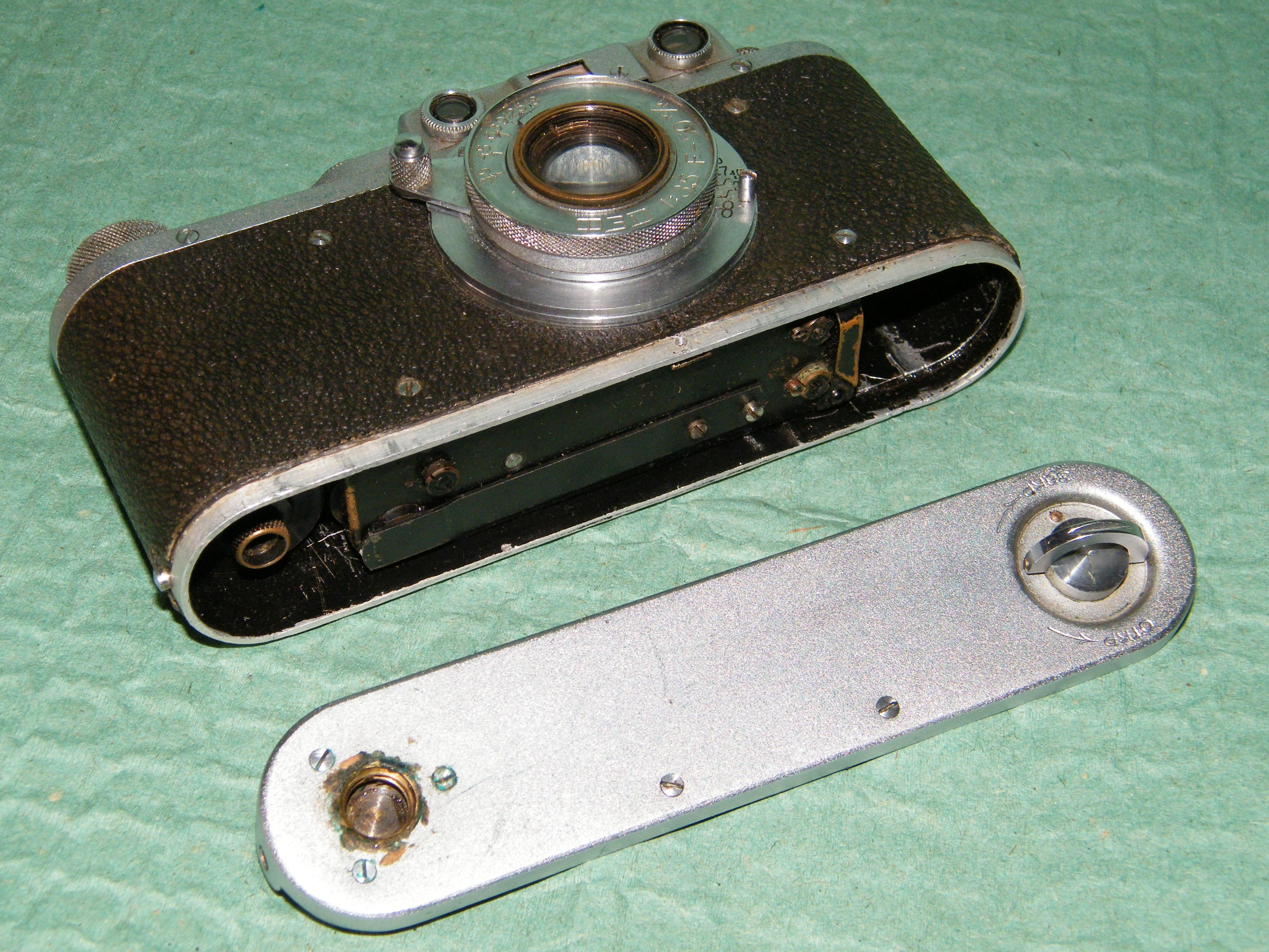 ФЭД-НКВД фотоаппарат